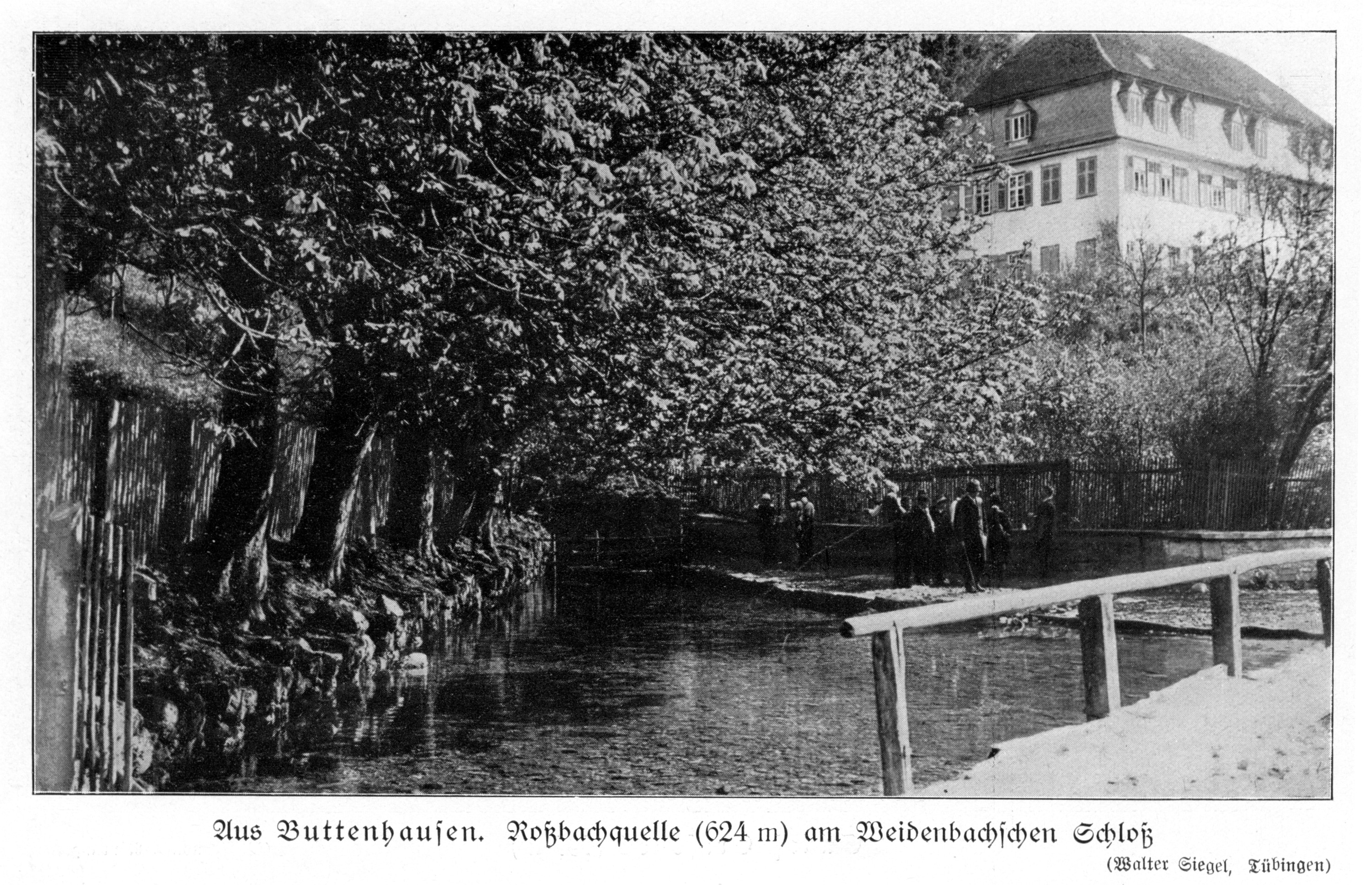 Aus Buttenhausen. Roßbachquelle (624 m) am Weidenbachschen Schloß.